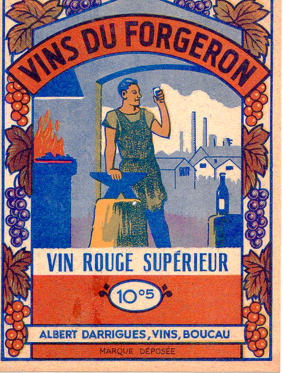 Vins du Forgeron